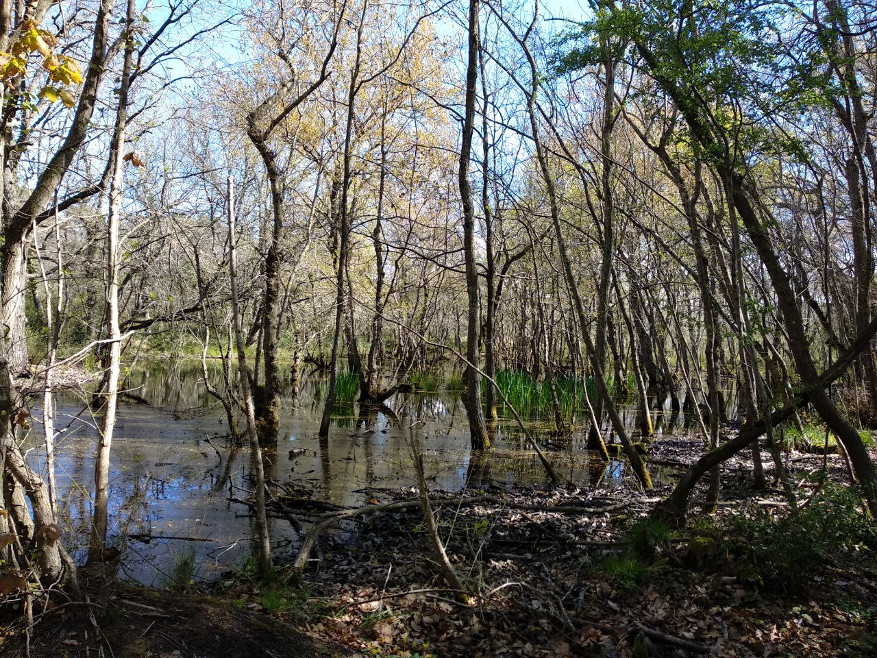 Roureda de Can Verdalet, roureda inundable de roure pènol